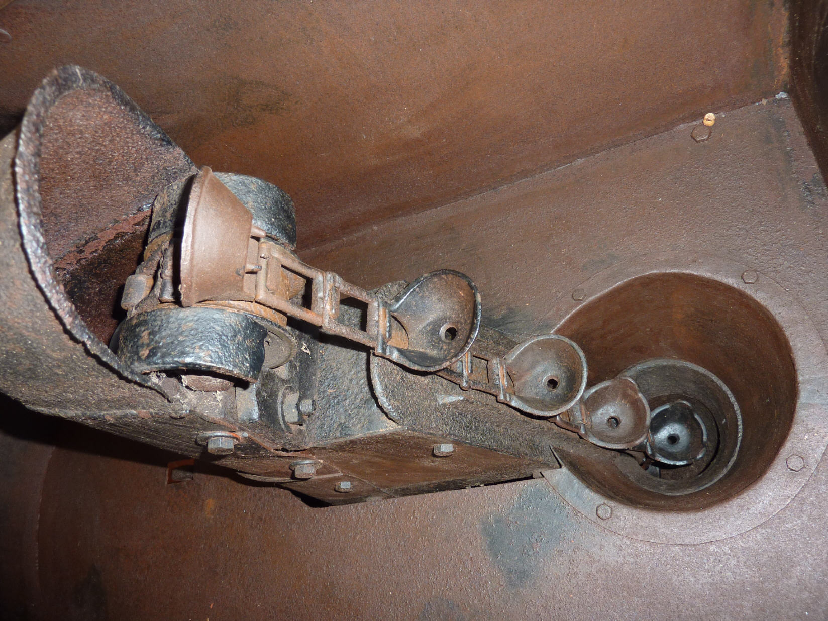 Blick ins Innere einer Kartoffellegemaschine aus der Zeit um 1910